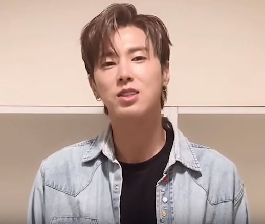 디스패치 인스타그램 팔로워가 300만을 돌파했답니다. 많은 스타들이 축하해 줬는데요. 축하영상을 모아봤습니다.